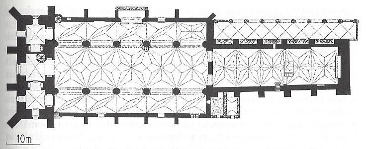 Grundriss des Königsberger Doms